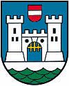 Wappen der Stadt Wels in Österreich